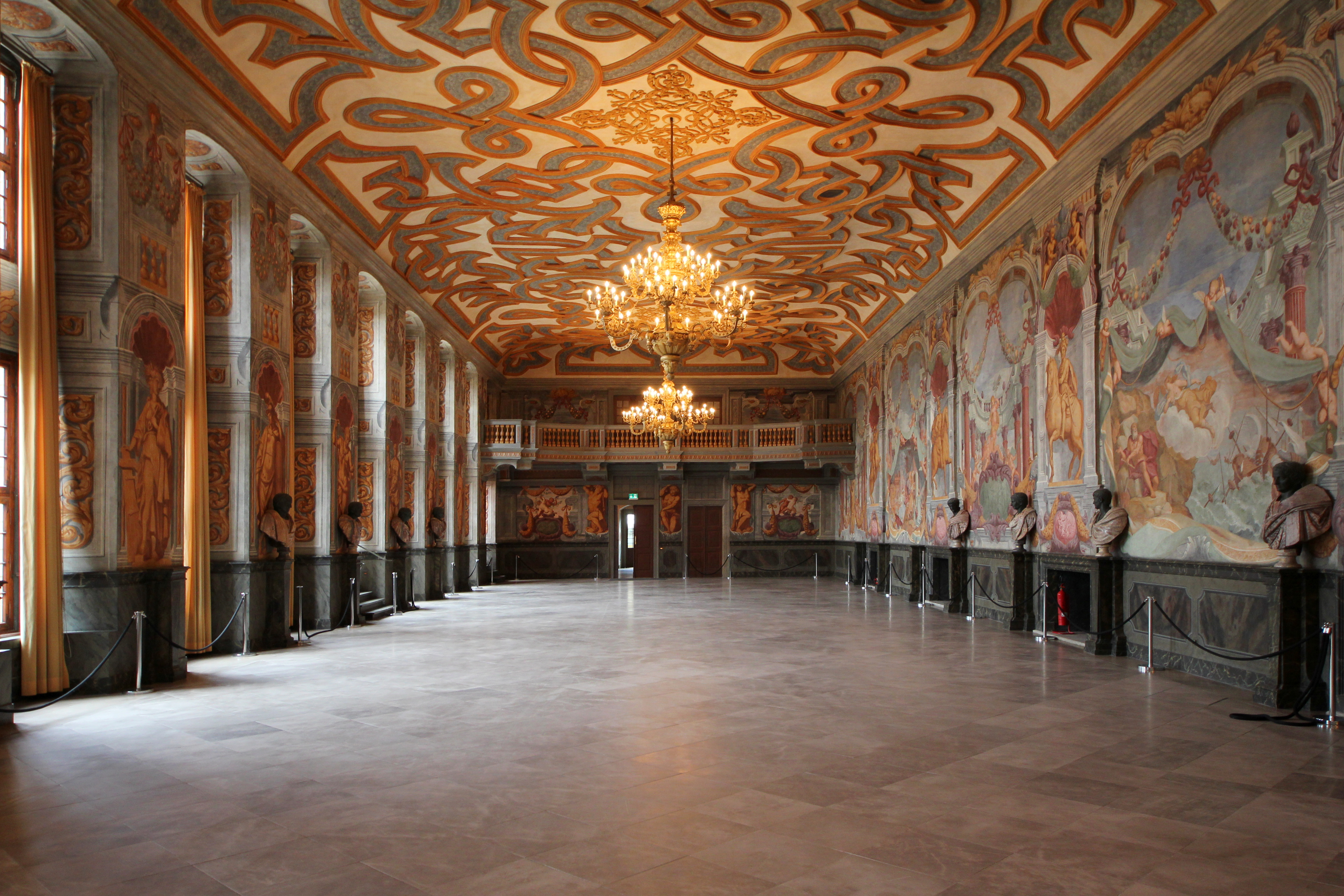 Ansicht aus dem Galeriegebäude im Großen Garten in Herrenhausen (Hannover).